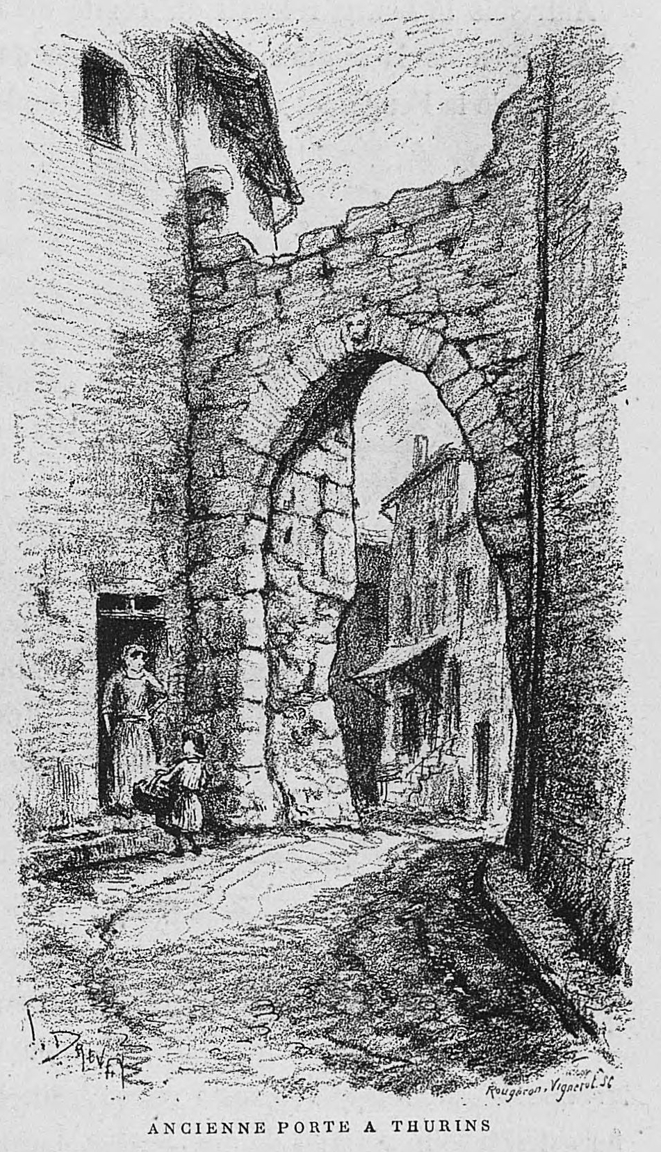 Aux environs de Lyon / Monsieur Josse ; préface de M. Coste-Labaume ; édition illustrée de 250 dessins de J. Drevet.